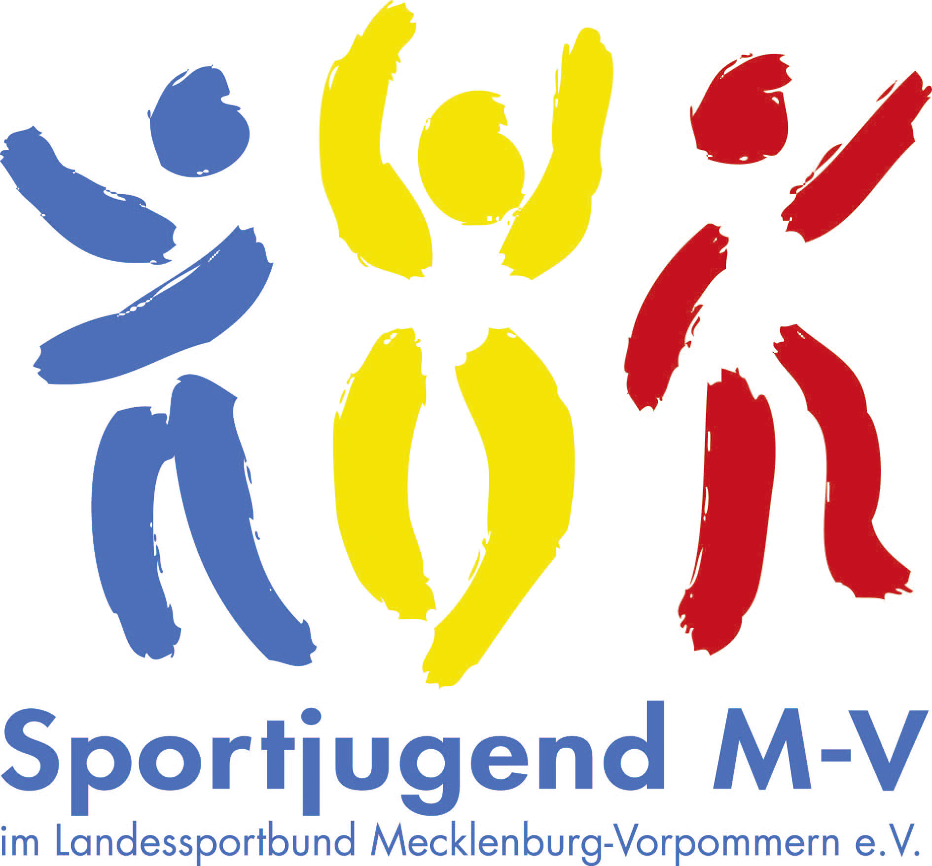 Logo der Sportjugend Mecklenburg-Vorpommern e.V.